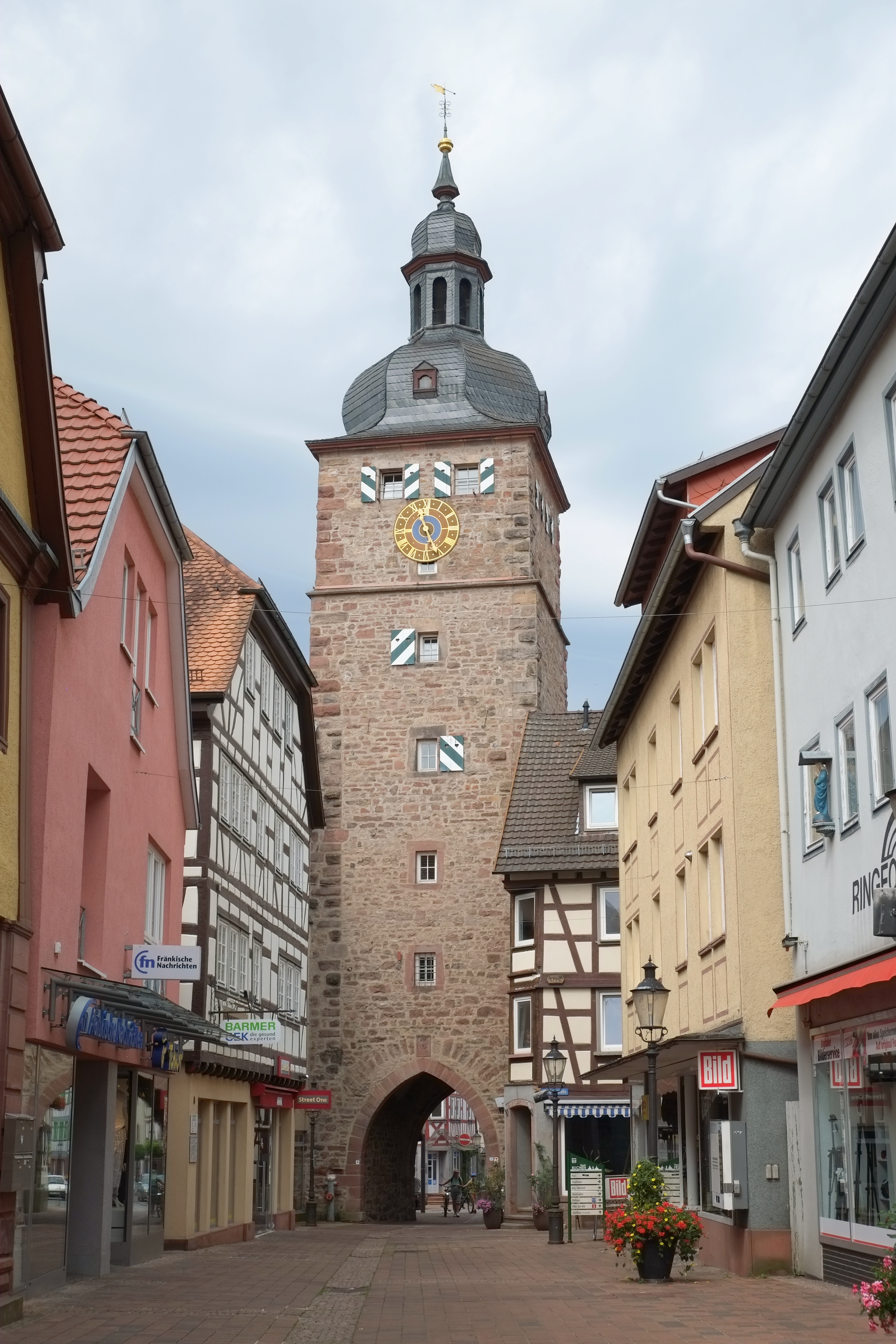 Stadtturm in Buchen (Odenwald) im Neckar-Odenwald-Kreis (Baden-Württemberg, Deutschland)